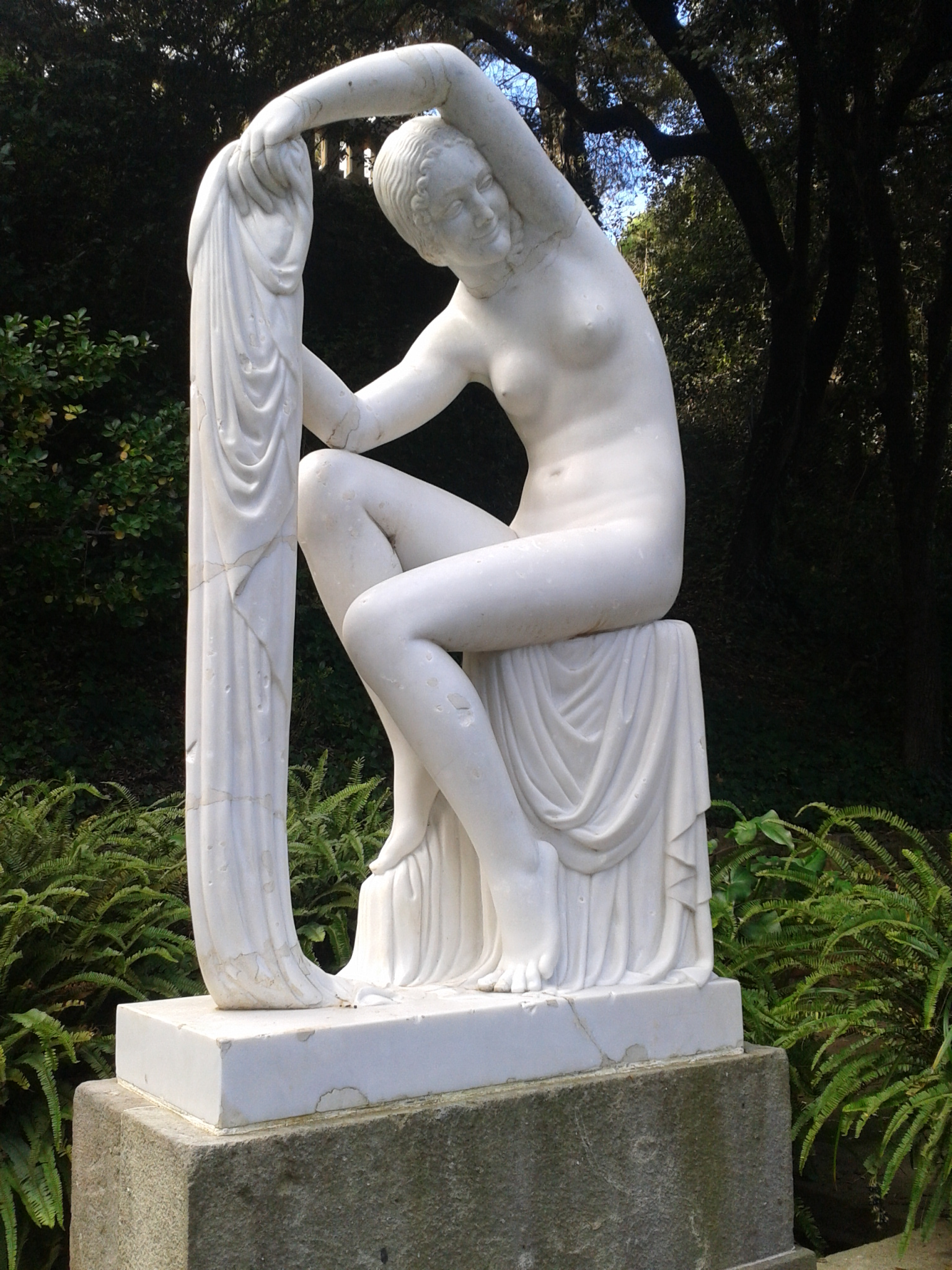 Roserar de la colla de l'arros (Jardins de Laribal). - Nu Femení de Jaume Otero